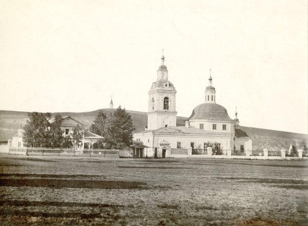 Всехсвятская церковь (Красноярск) 1820-1930